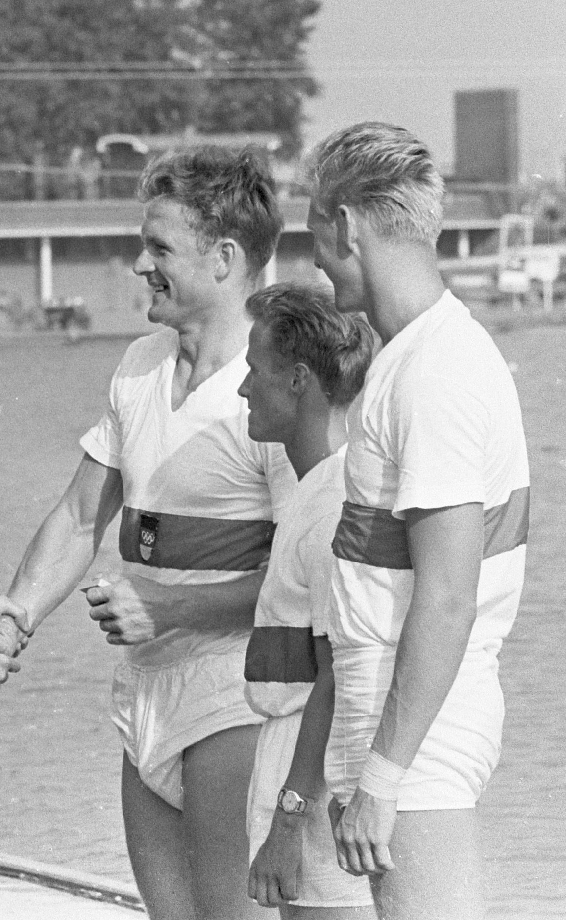 Europese roeikampioenschappen Bosbaan, 20 en 21 R. Groen prijsuitreiking, 24 Duitse twee met. ID, ID2